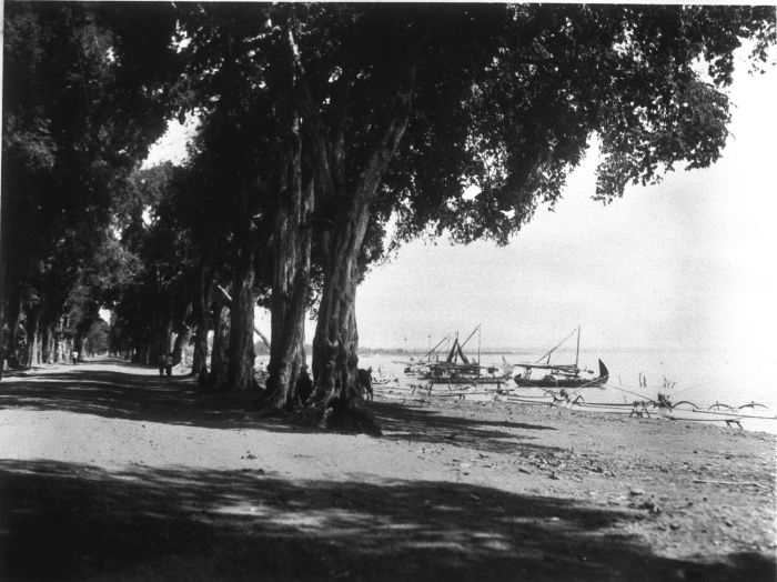 Foto. Kustweg bij Mlandingan aan de Straat Madoera langs Oost-Java